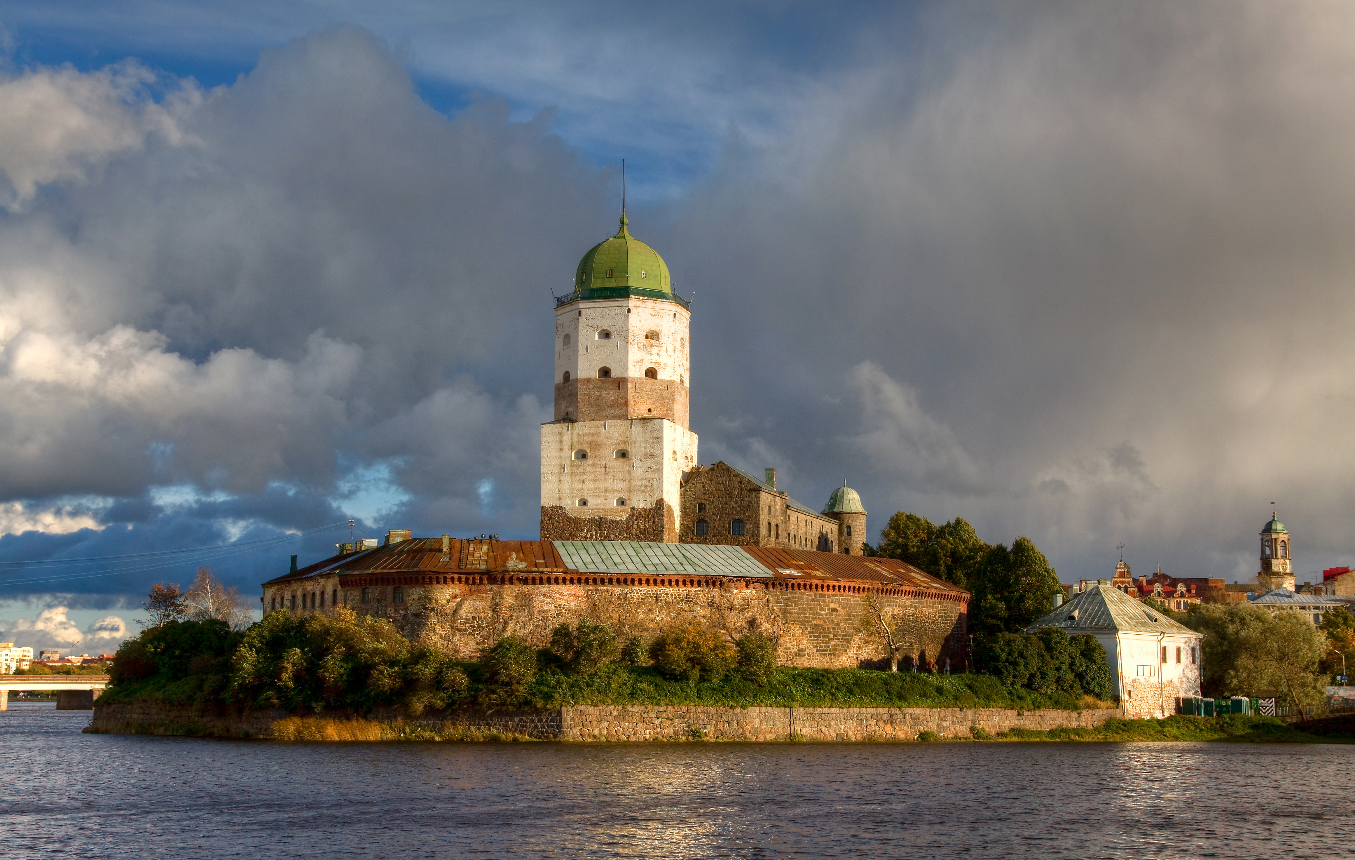 Выборгский замок, башня Олафа (Ленинградская область, Выборг, Выборгская слобода, о. Замковый)